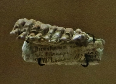 Fossil of Dremotherium - Took the picture at Natural History Museum, Basel